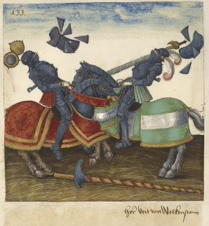 Freydal, fol. 133, Herr Veit von Wolkenstain